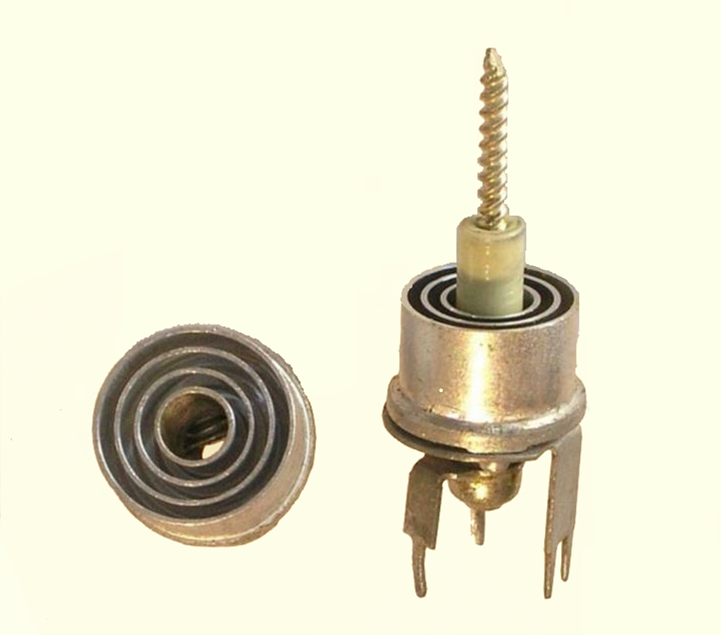 Geöffneter Tauchtrimmer